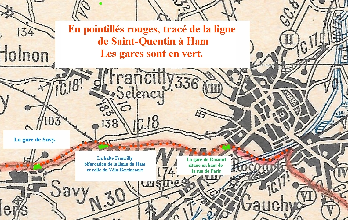 Carte de la ligne de Saint-Quentin à Ham Partie 1